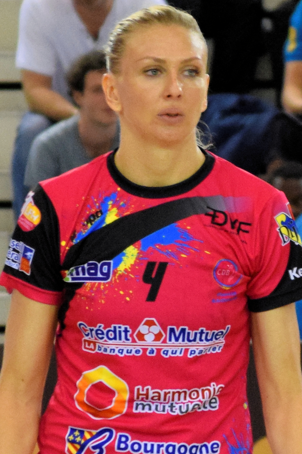 Anastasiya Pidpalova, arrière gauche du club de handball Cercle Dijon Bourgogne. Le 19 octobre 2014 lors du match de la 10e journée de championnat féminin, Issy Paris Hand / Cercle Dijon bourgogne.